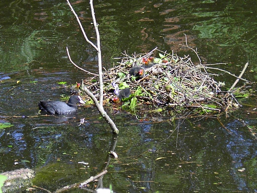 Nest met meerkoeten in de Nieuwe Vecht.